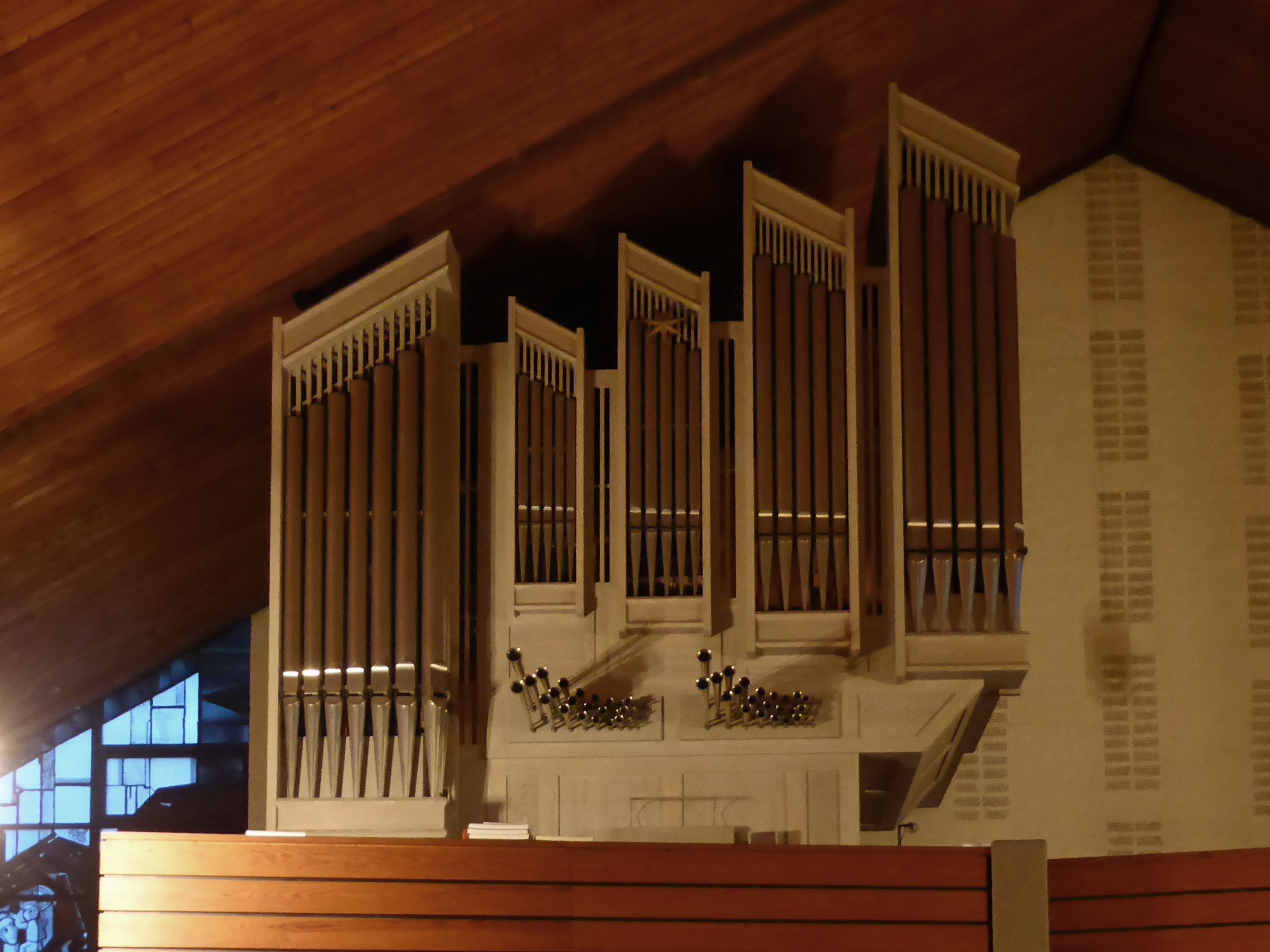 Orgel in der katholischen St.-Christophorus-Kirche in Hannover, Stadtteil Stöcken.